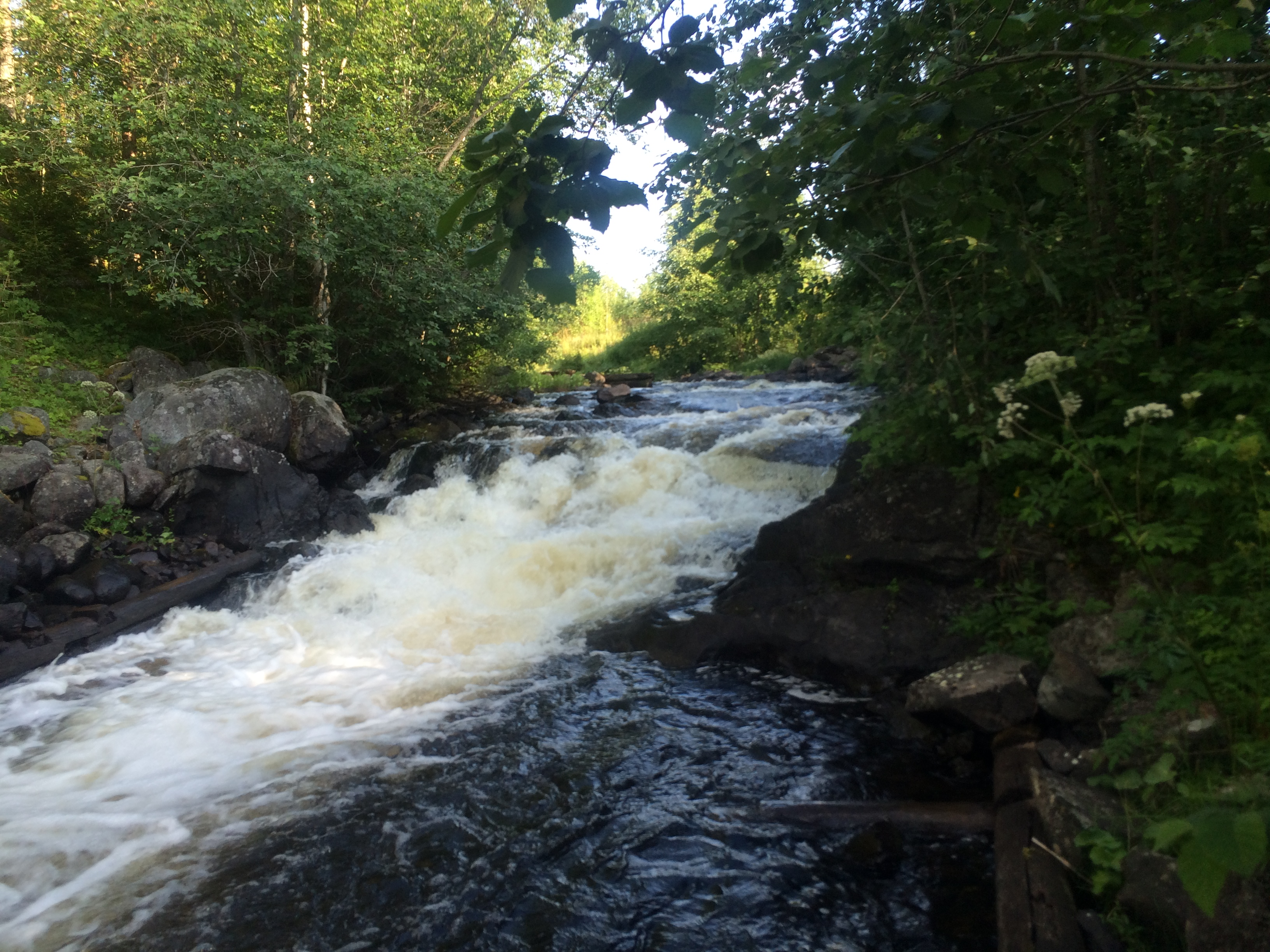 Остёр (приток Кумсы)